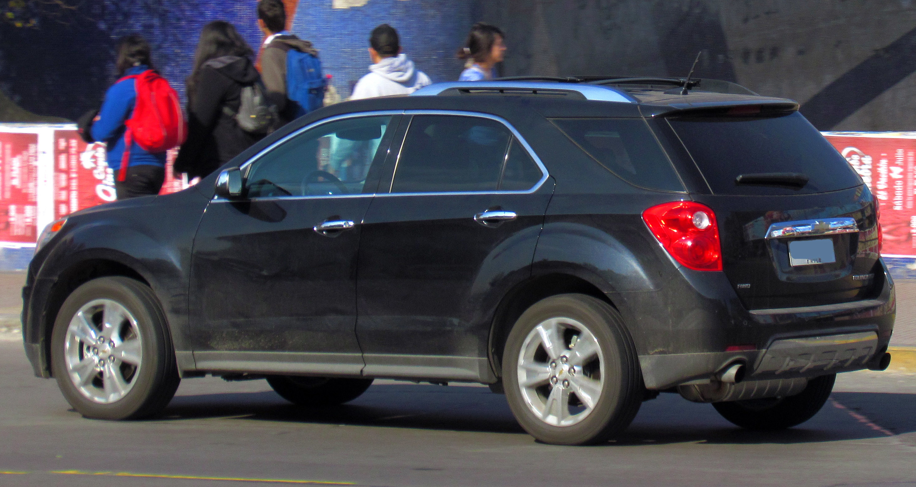 Chevrolet Equinox 3.6 LTZ AWD 2011